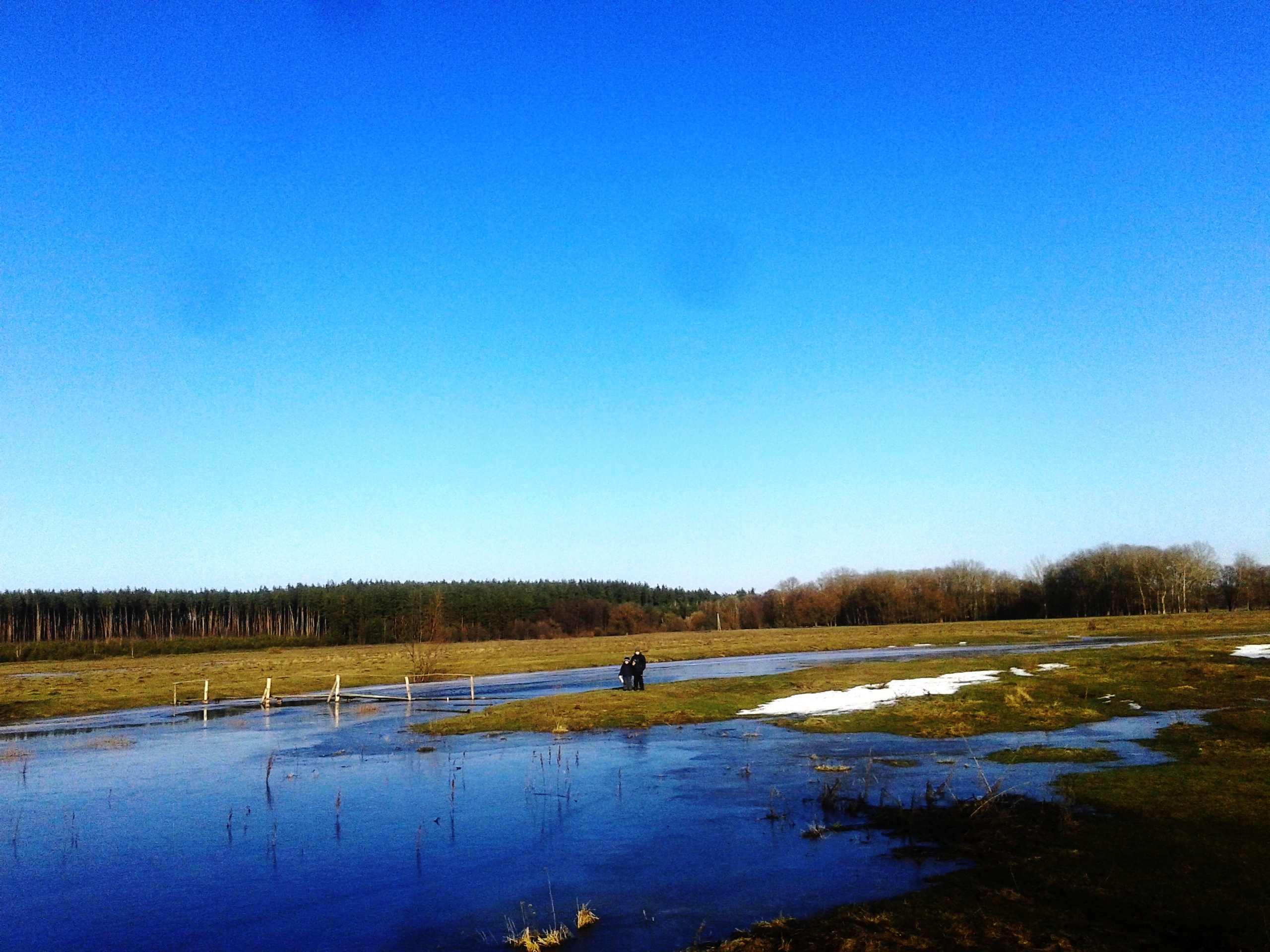 р. Сула